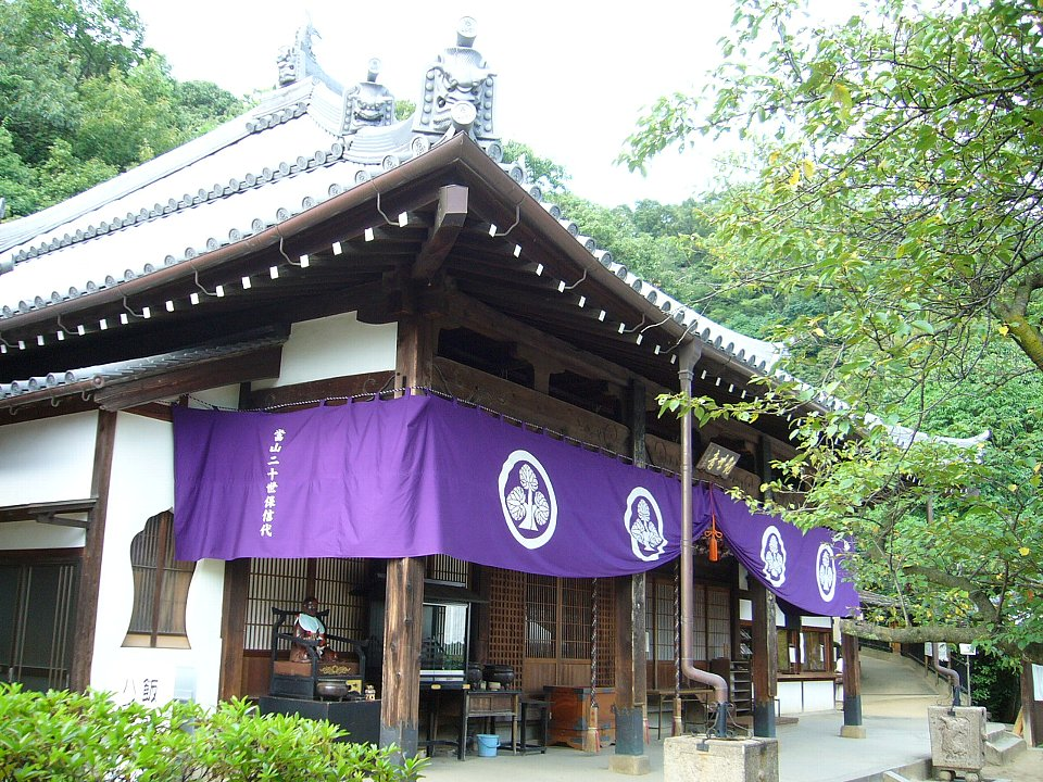 野崎観音 本堂 2006年9月 Bakkai撮影